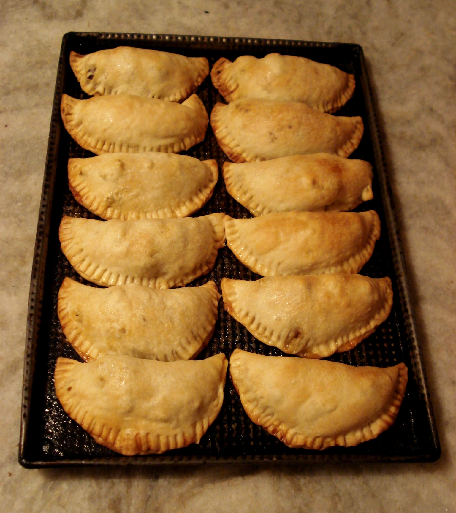 Una docena de empanadas caseras argentinas cocidas al horno